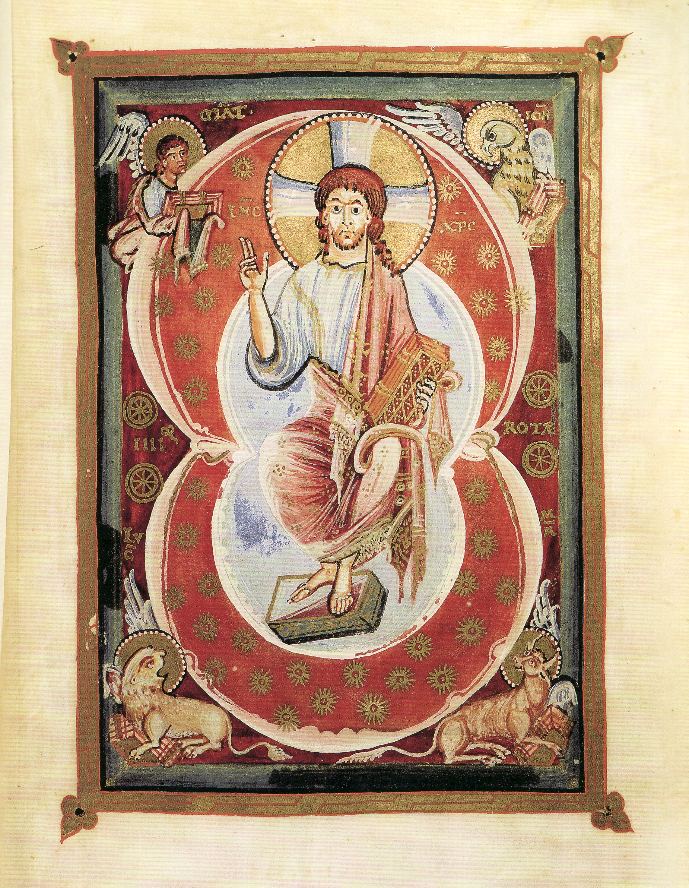 Majestas Domini aus dem Hitda-Codex (Hess. Landes- und Hochschulbibliothek Darmstadt Hs. 1640, fol. 7r), Kölner Buchmalerschule, erste Hälfte 11. Jh.